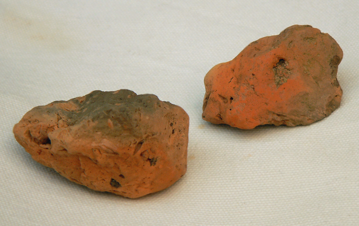 Hüttenlehm aus prähistorischem Fundzusamenhang aus der Zeit um etwa 5000 v. Chr.